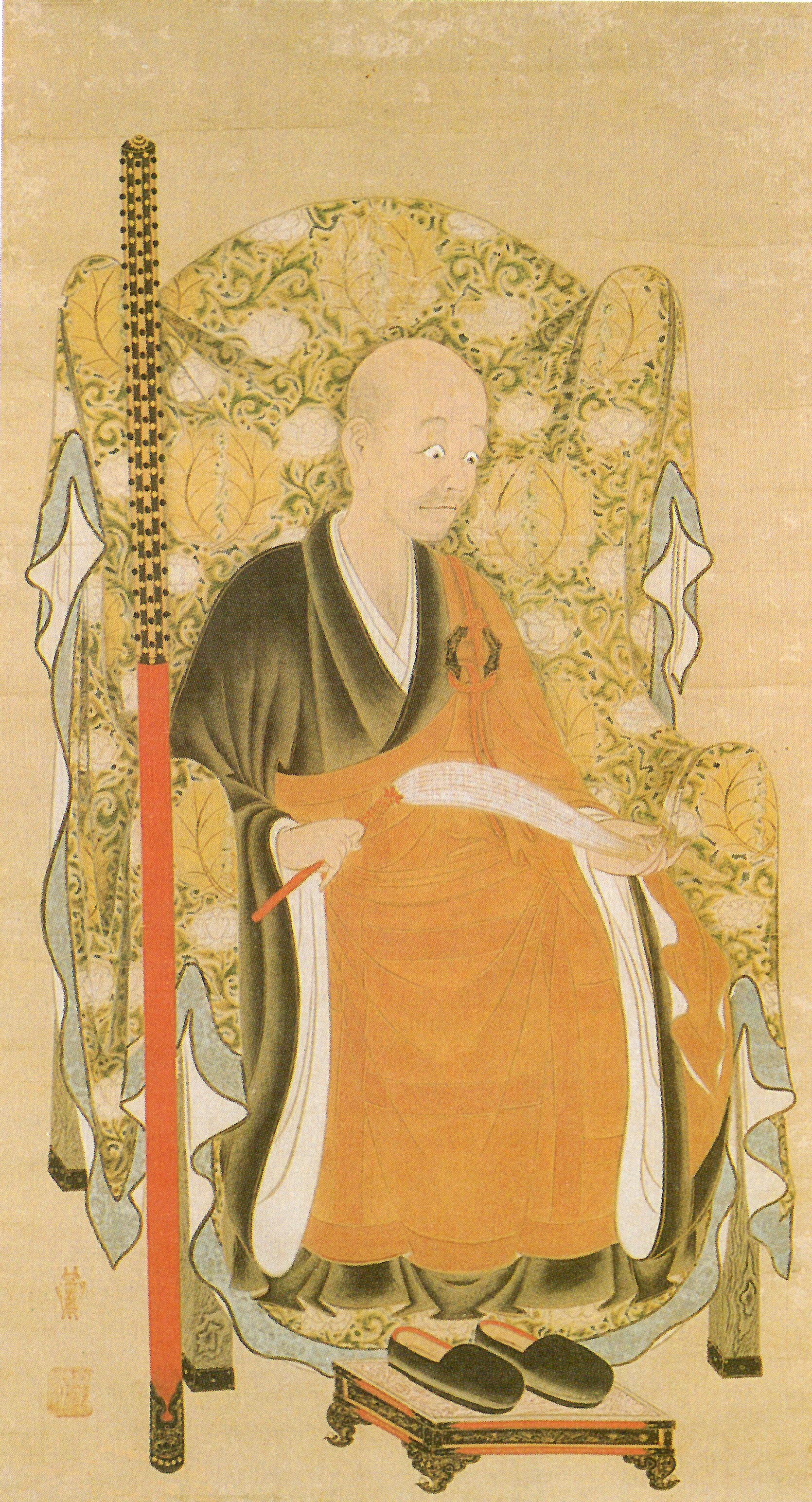 大関高増の肖像。